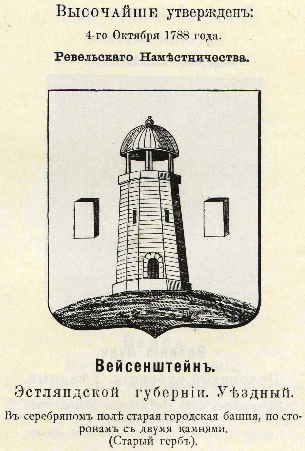 Official Russian Empire coat of arms: Veisenshtein. Гласный герб Российской Империи уездного города Вейсенштейн (нем. Белый камень) Эстляндской губернии (в 1788 - Ревельского наместничества) с официальным описанием в Гербовнике Винклера.